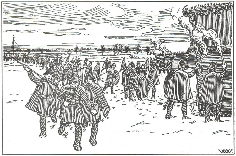 Wilhelm Wetlesen: Illustration for Magnus den godes saga, Heimskringla 1899-edition. nn: «Kong Magnus for med hærskjold over Sjælland.»